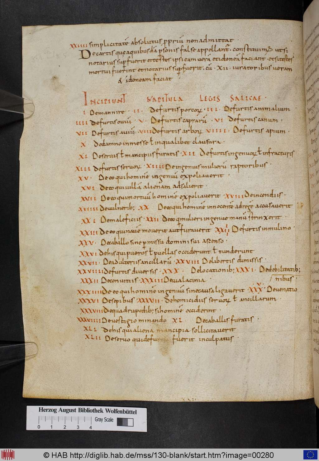 Lex Salica